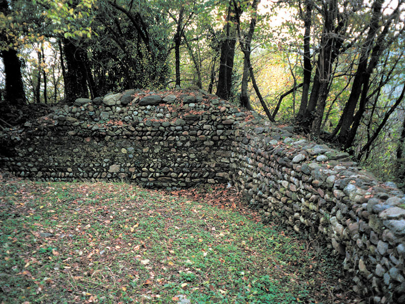 Bric San Vito (Pecetto, Torino) - Recinto del castello medievale del X-XIII secolo, porzione delle mura a ovest del sito.